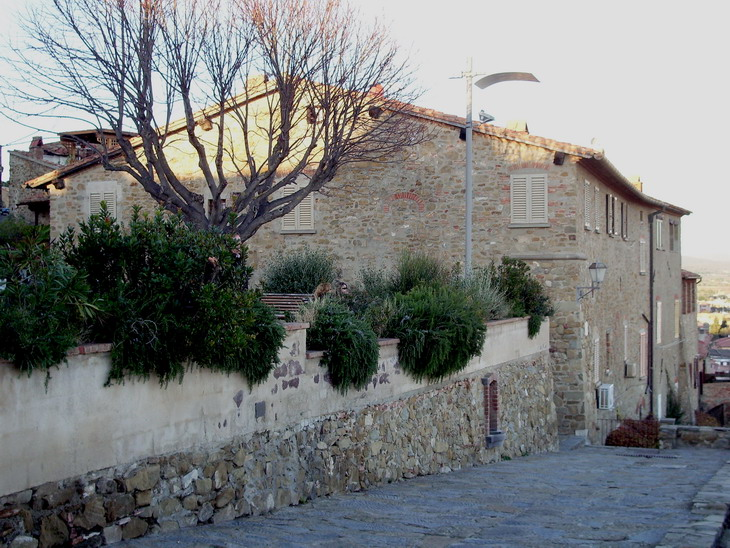 Veduta d'insieme dell'ex Palazzo Pretorio di Castiglione della Pescaia